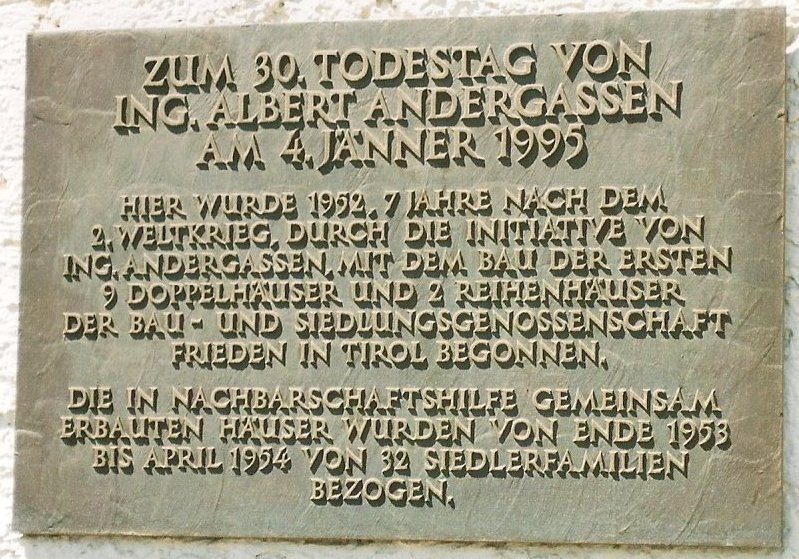 Gedenktafel am Ing.-Albert-Andergassen Platz in Neu Rum bei Innsbruck